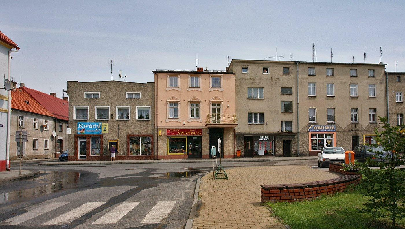 Wschodnia pierzeja rynku.